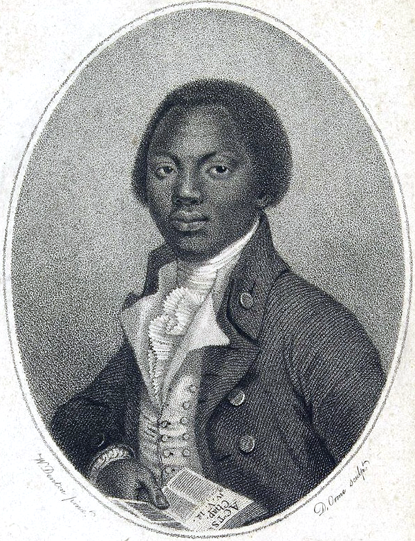 Olaudah Equiano, aka Gustavus Vassa